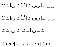 Stropha Alcaica